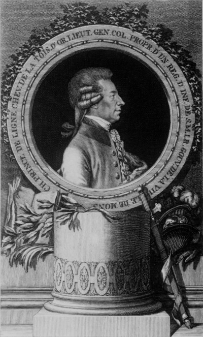 Charles Joseph de Ligne (1735-1814), Feldmarschall, Schriftsteller. Material und Technik: Kupferstich